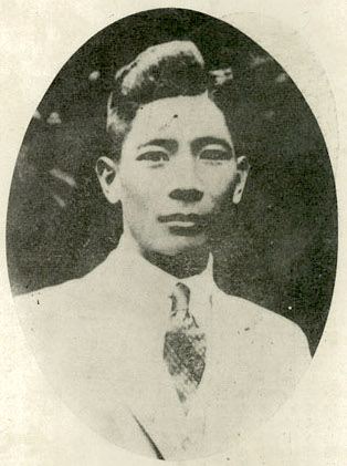 Bân-lâm-gú: 陳啟川 TÂN Khé-chhoan